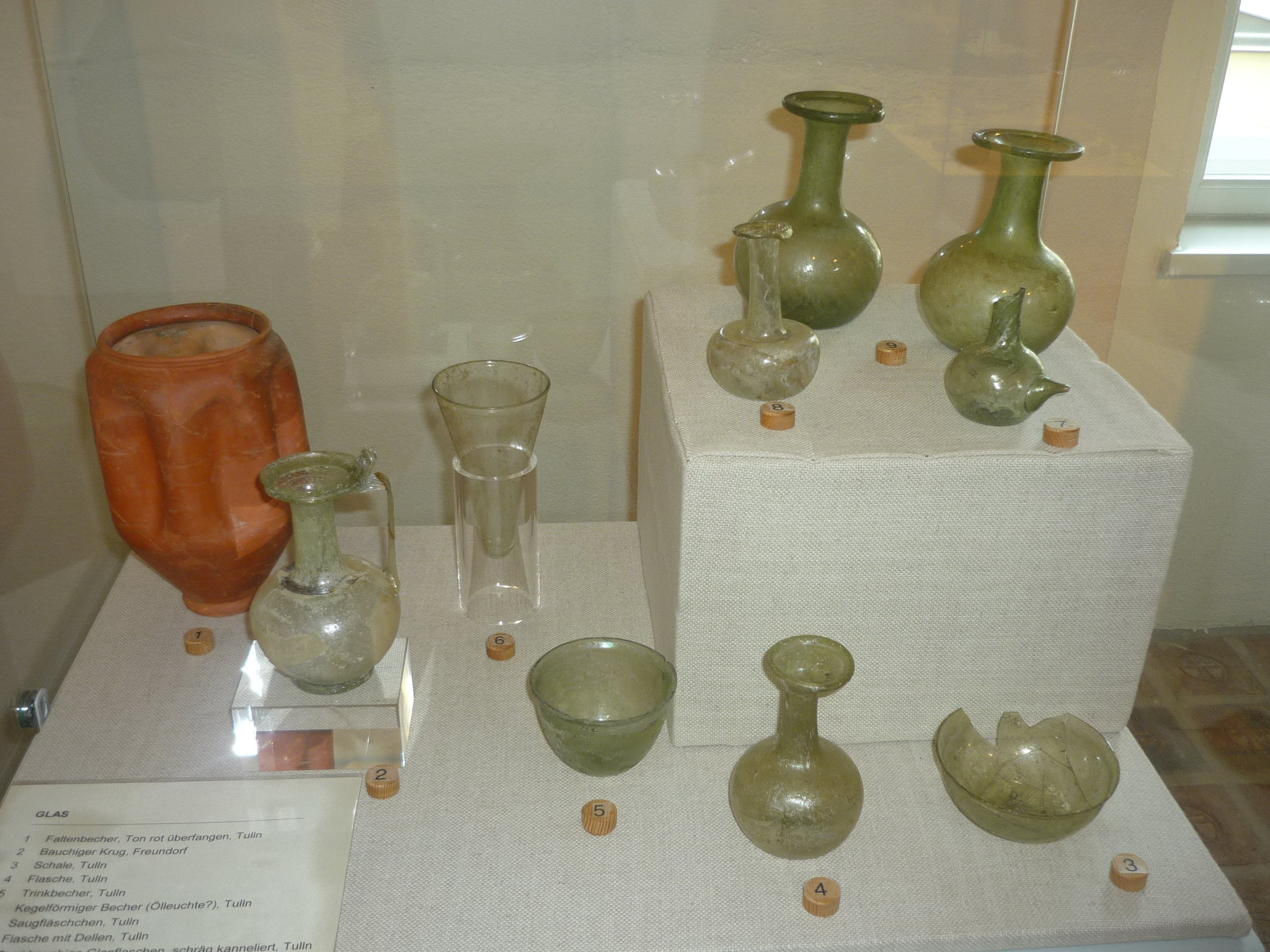 Diverse Glasfunde aus dem römischen Tulln - Römisches Museum Tulln